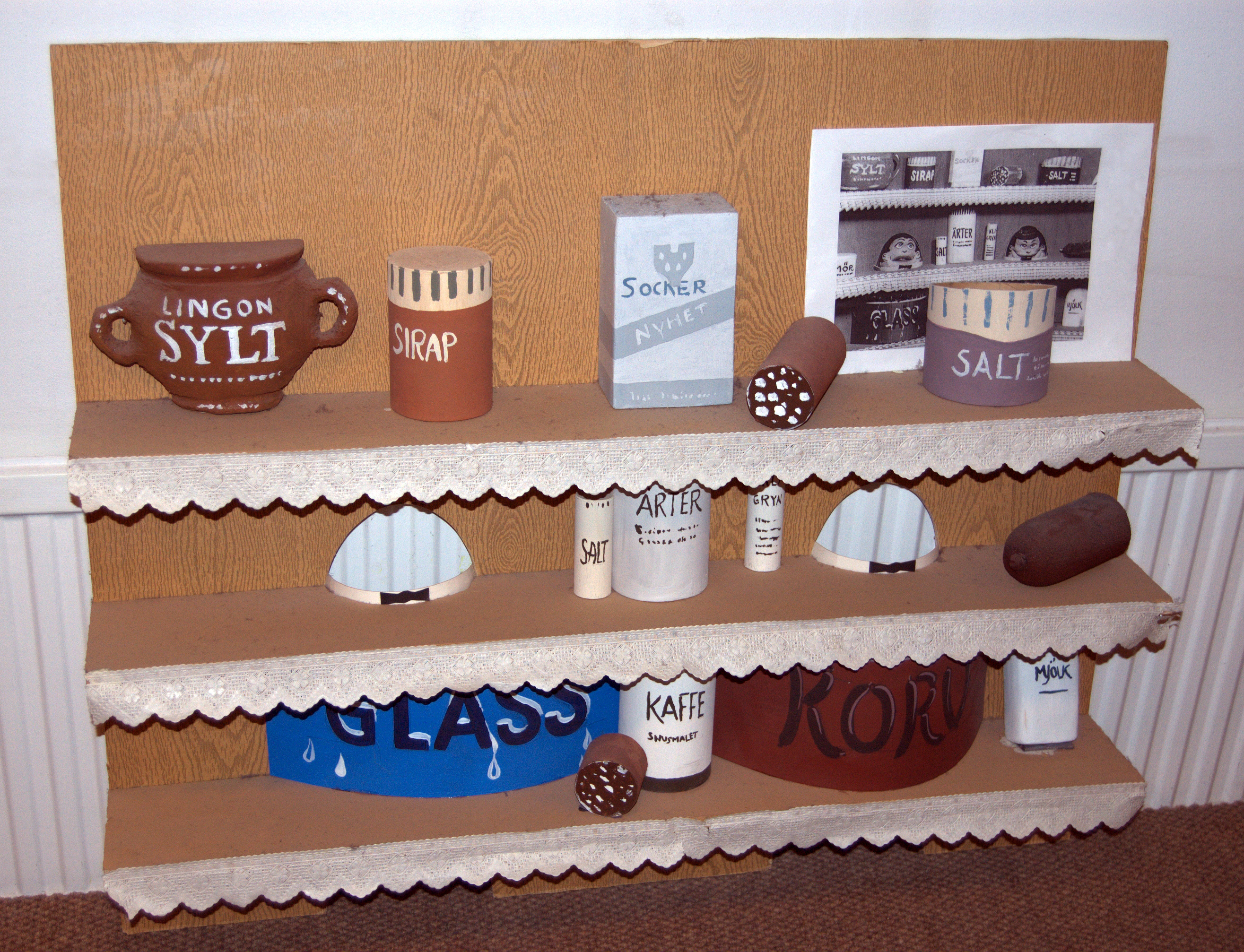 Humle och Dumles skafferi, som finns i Sveriges Televisions museum i TV-huset i Stockholm.